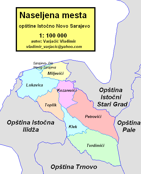 Opština Istočno Novo Sarajevo